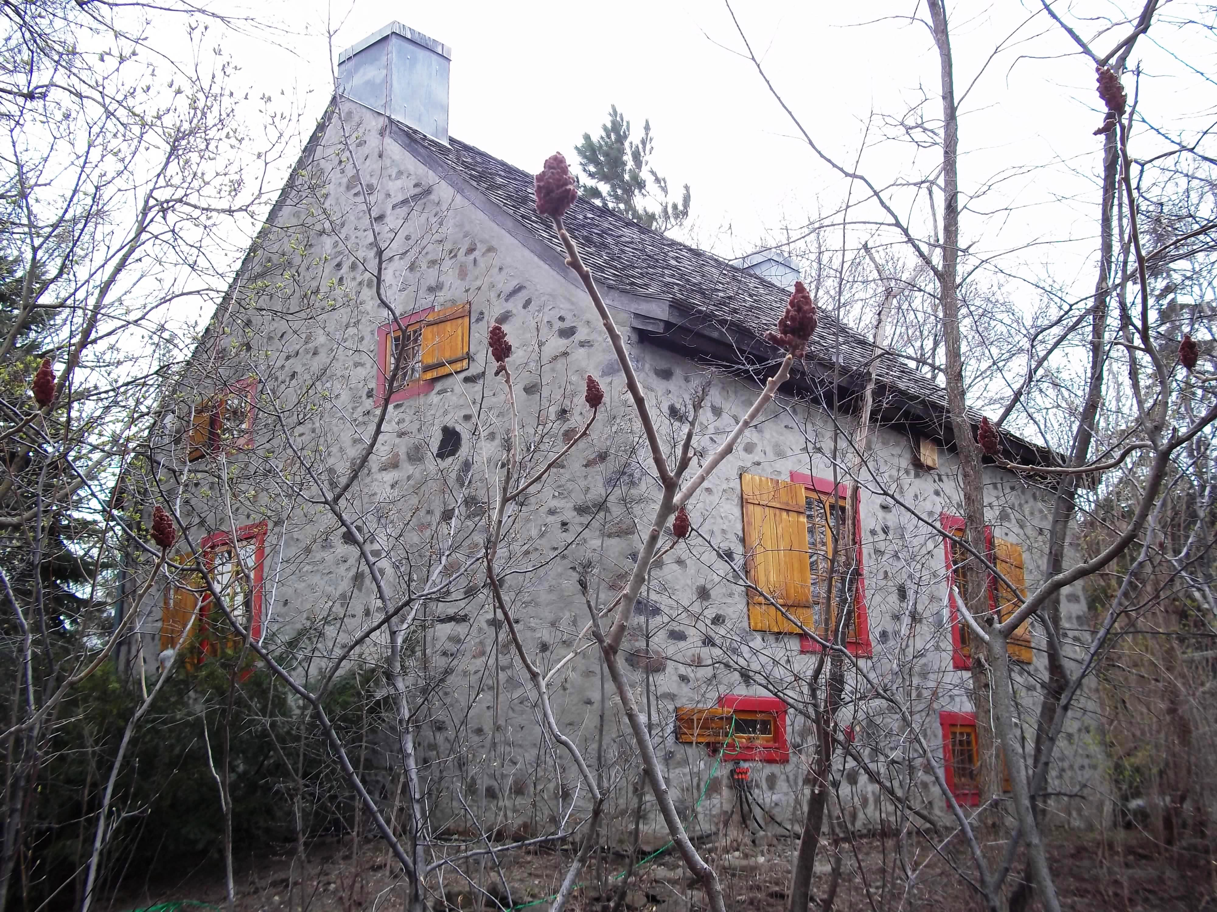 Maison Andegrave, 5460 boulevard Gouin Est, Montréal-Nord, Montréal